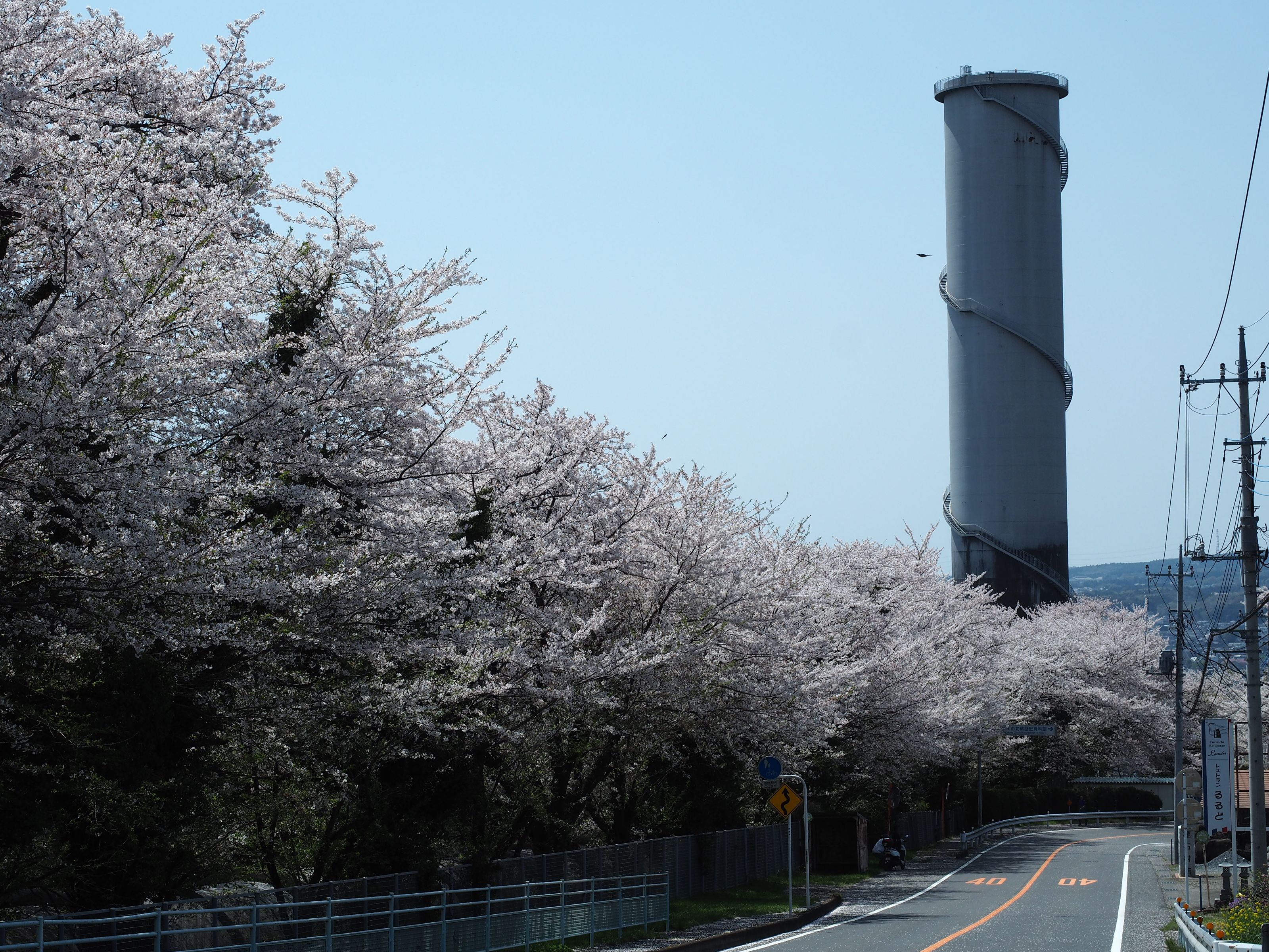 佐久発電所管路沿い桜並木